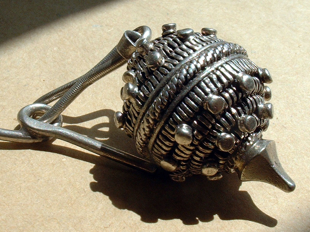 Srebrno puce, botun ili toka, dio narodne nošnje sjeverne Dalmacije u Hrvatskoj.